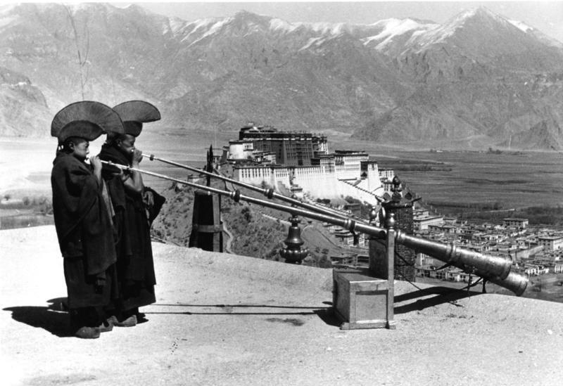 Lhasa, Medizinberg, Lamas blasen Tuben